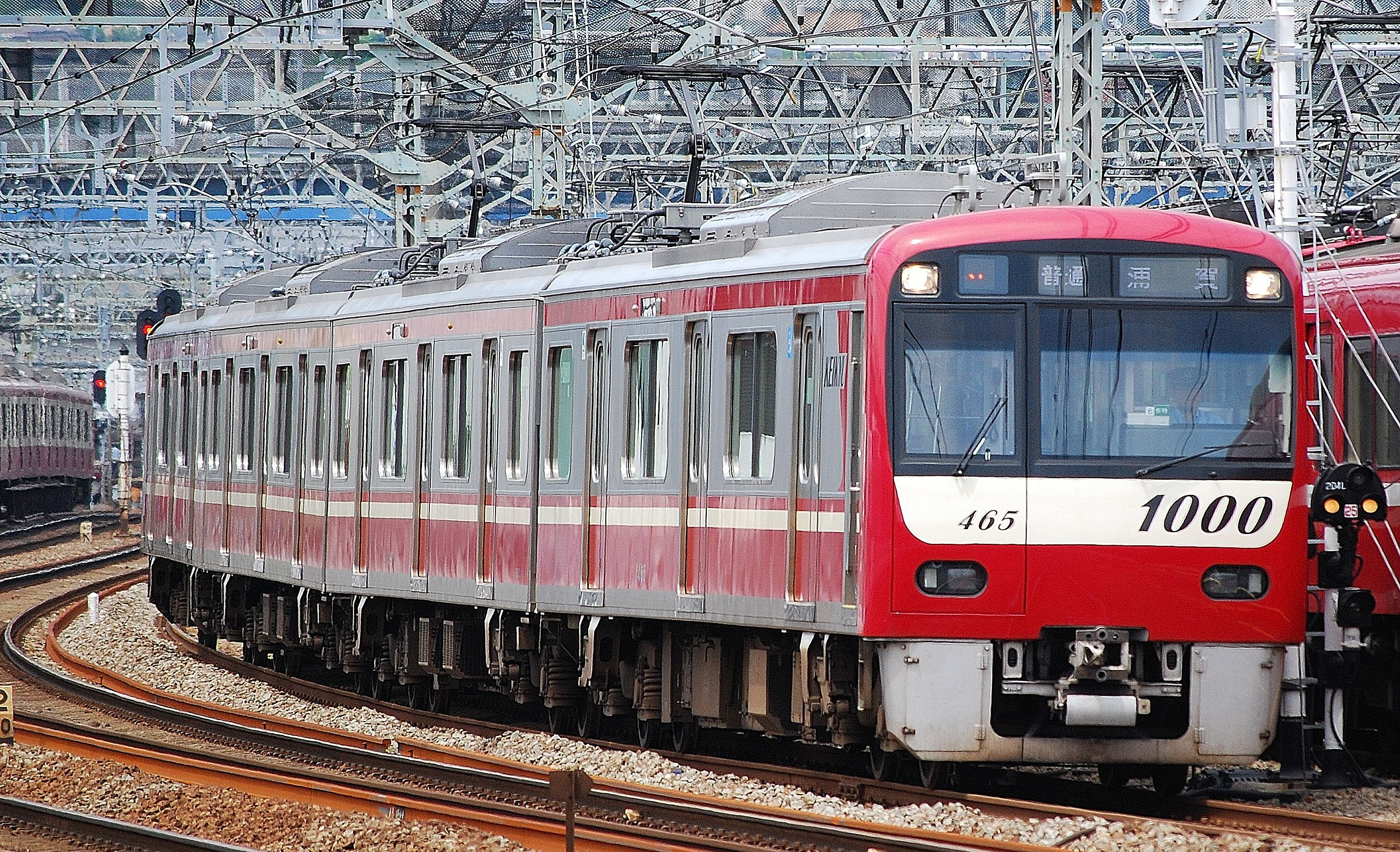 京浜急行電鉄1000形電車 (2代) ９次車